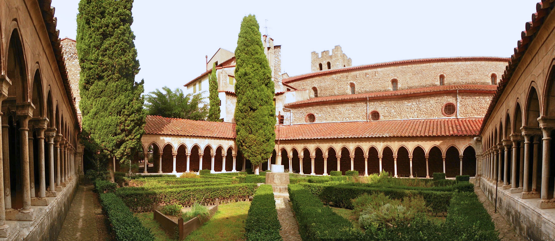 Claustre de l'abadia de Santa Maria d'Arles (Vallespir)